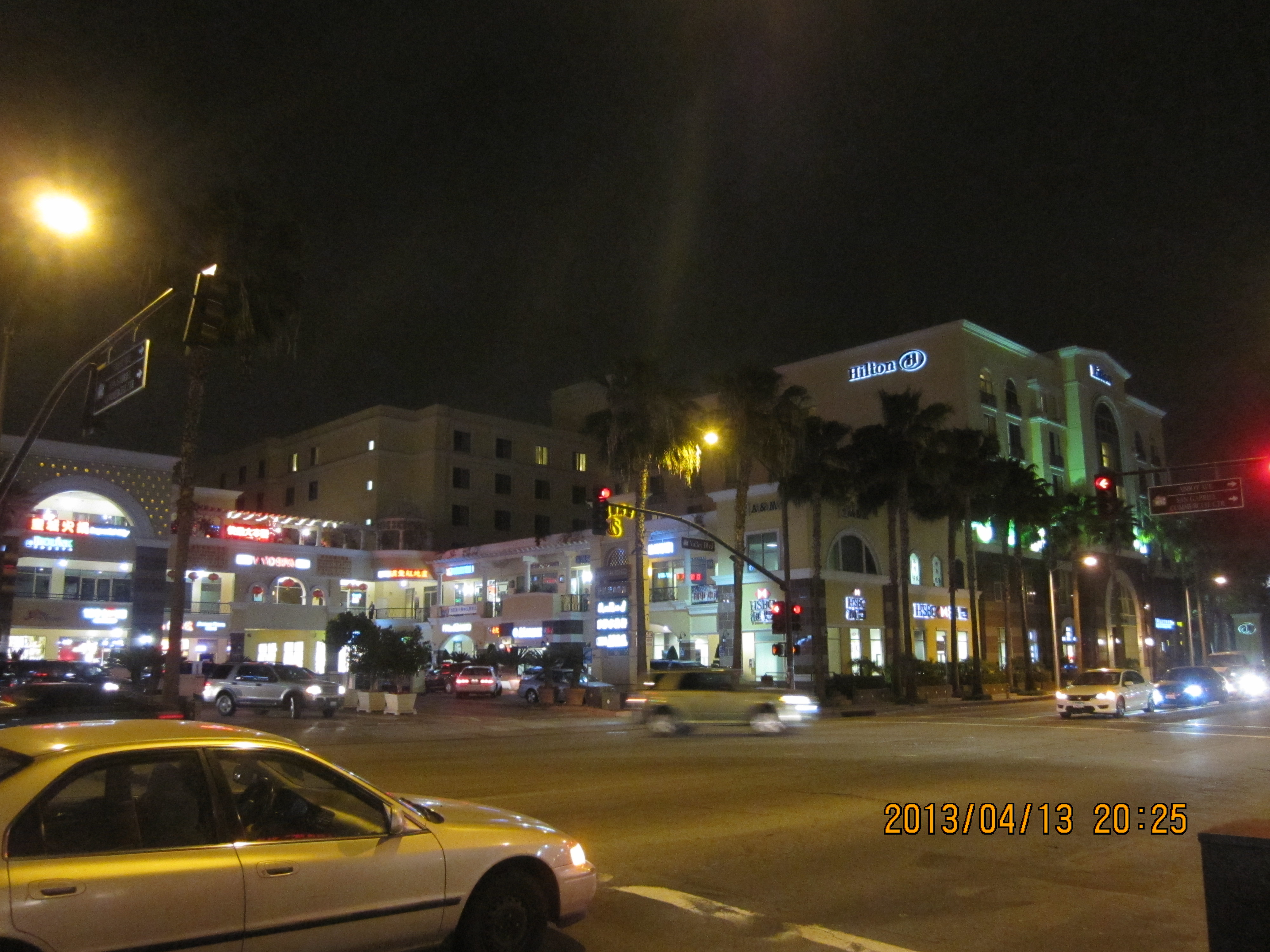 San Gabriel, CA, USA